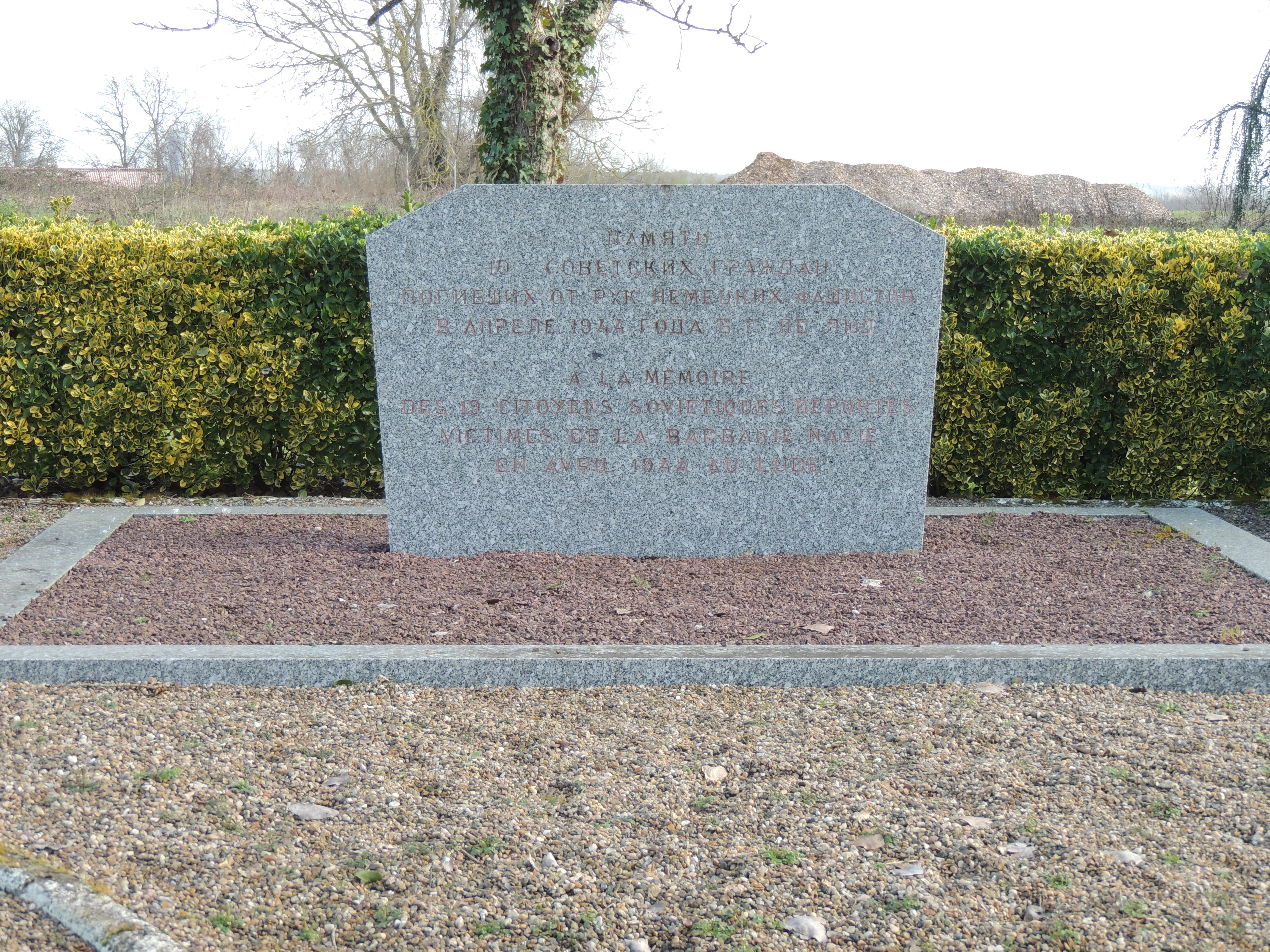 Stèle en l'honneur des prisonniers russes morts en détention au Lude pendant la Seconde Guerre mondiale.